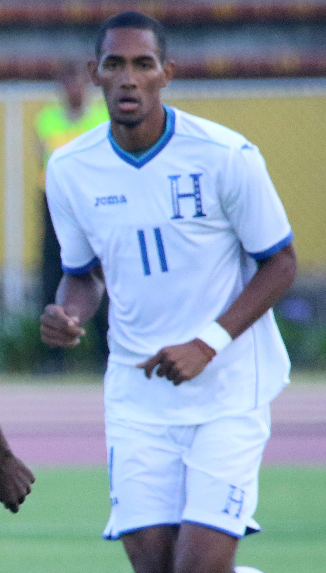 Quito, 08 de sept. (Andes).-Ecuador enfrenta a Honduras en partido amistoso jugado en el estadio Olimpico Atahualpa. En la gráfica Walter Ayoví (10) de Ecuador, disputa el balón con Jerry Bengtson (11) de Honduras. Foto:César Muñoz/Andes